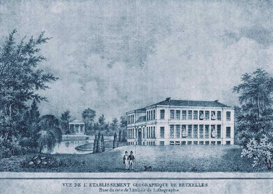 Etablissement géographique de Bruxelles (1830-1880). Lithographie vers 1840.